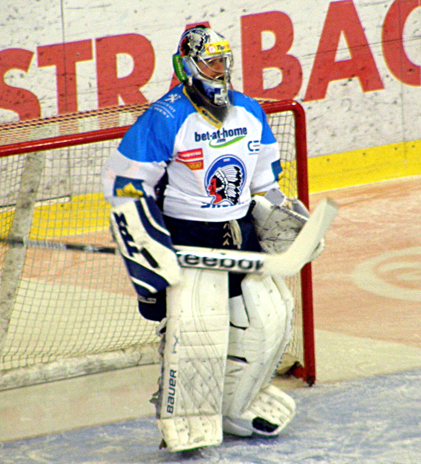 Adamov Svoboda v zápase Plzeň proti Brnu, Kajot Aréna (6.12.2011)